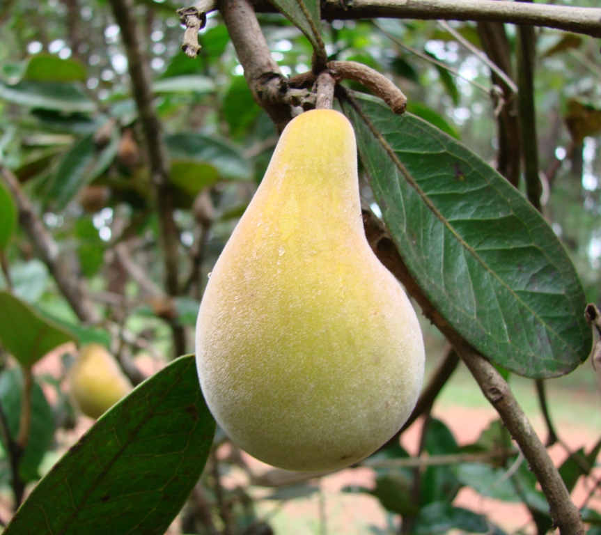 Eugenia klotzschiana - MYRTACEAE Jardim Botânico de Brasília - Distrito Federal - Brasil